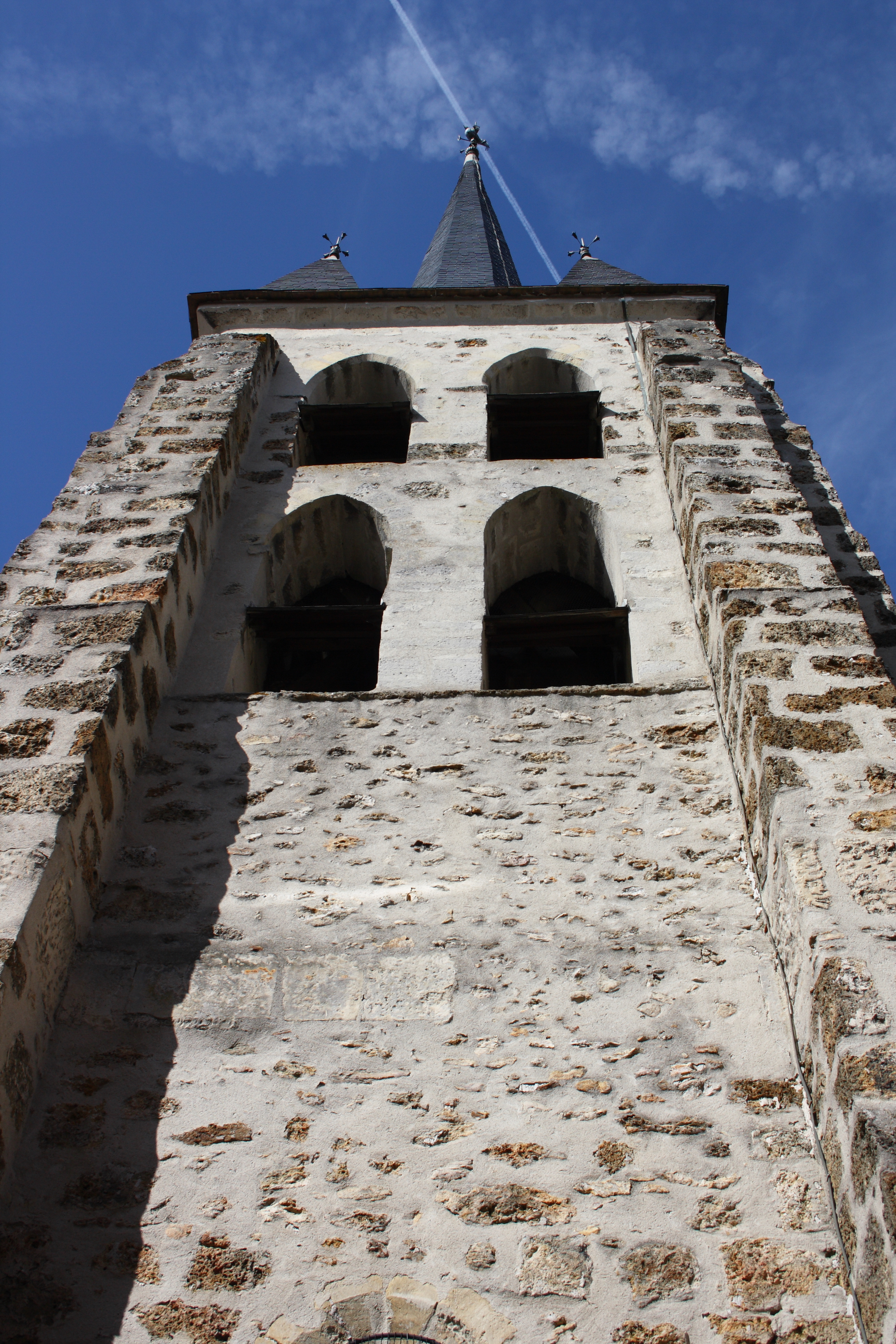 Katholische Pfarrkirche Saint-Martin in Jouy-en-Josas im Département Yvelines in der Region Île-de-France (Frankreich), Glockenturm